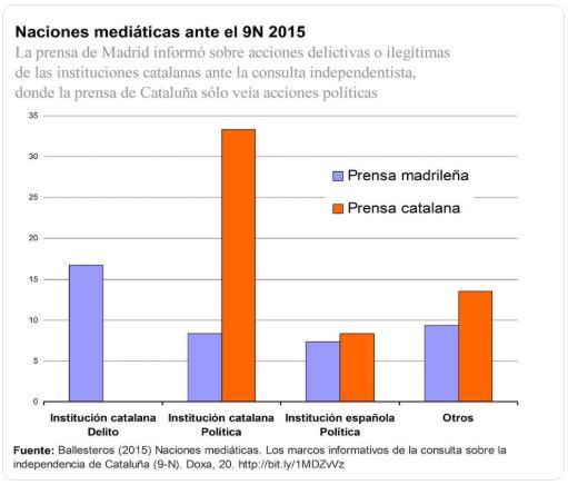 La prensa de Madrid informó del "referéndum" como acción delictiva, mientras la de Cataluña lo interpretó como acción política democrática